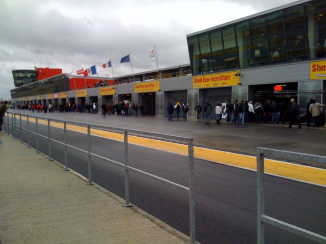 Nogaro Circuit pitlane